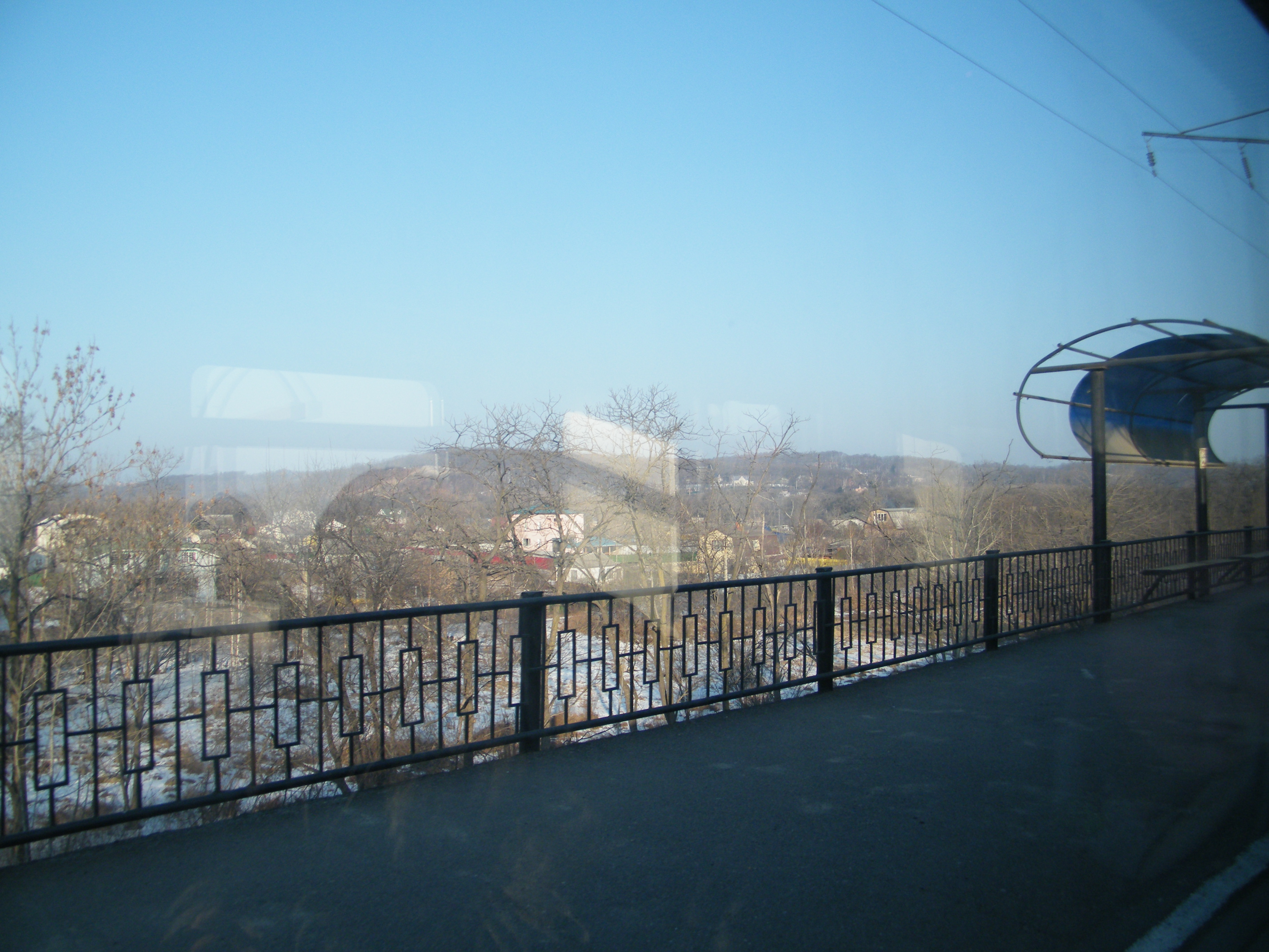 Платформа Спутник Владивосток